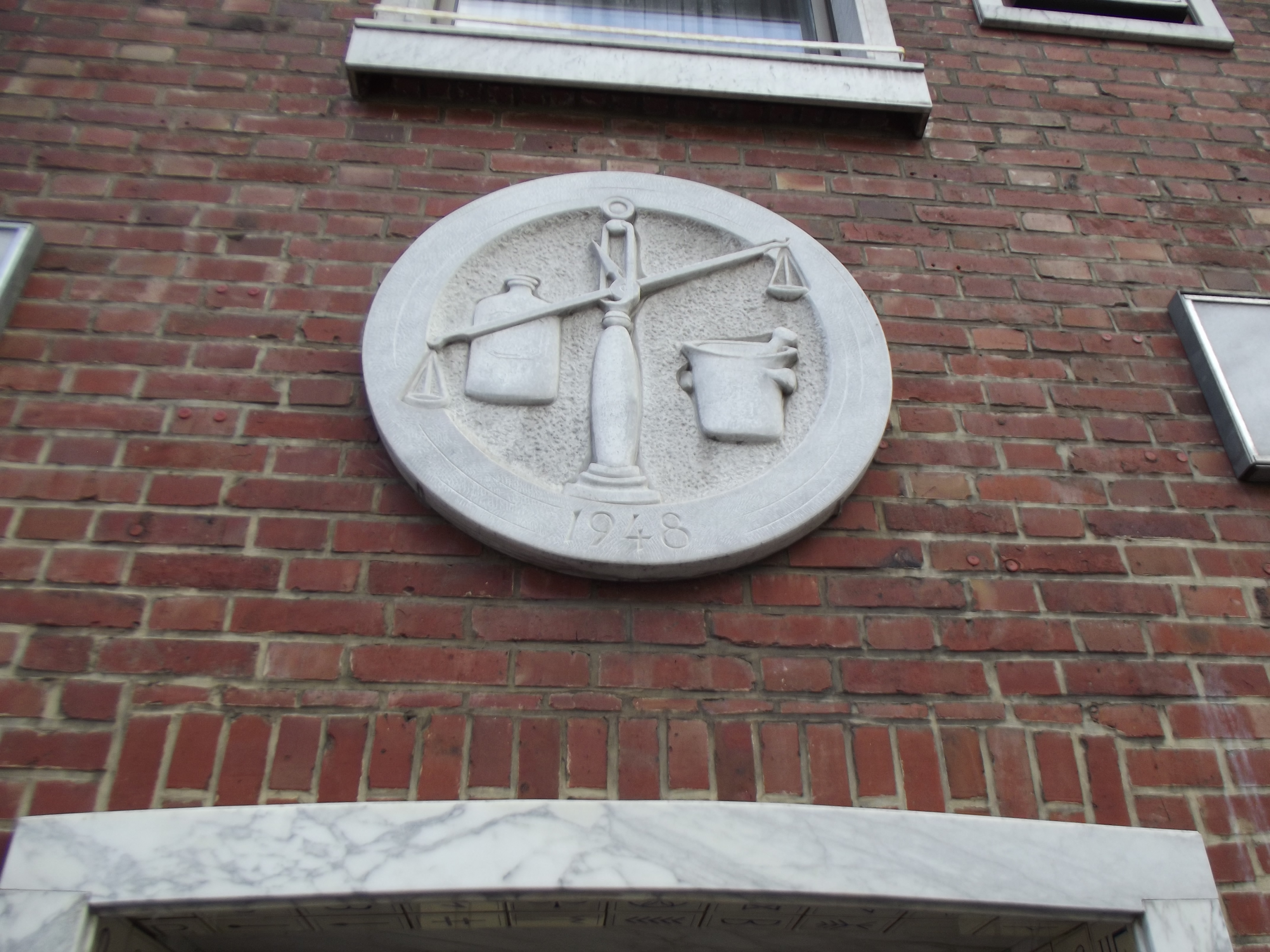 Un pharmaceutique symbole au-dessus d'une porte